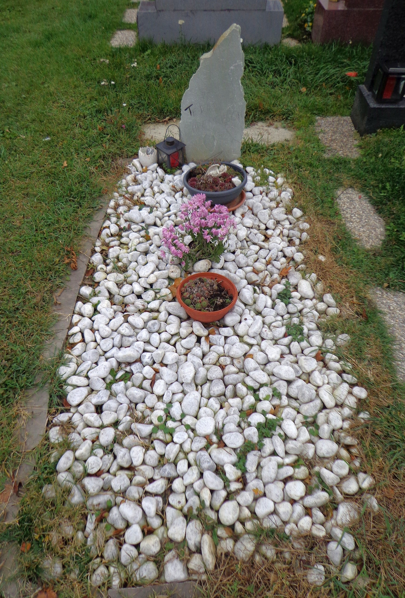 Wiener Zentralfriedhof - Gruppe 40: ehrenhalber gewidmetes Grab von Teddy Ehrenreich